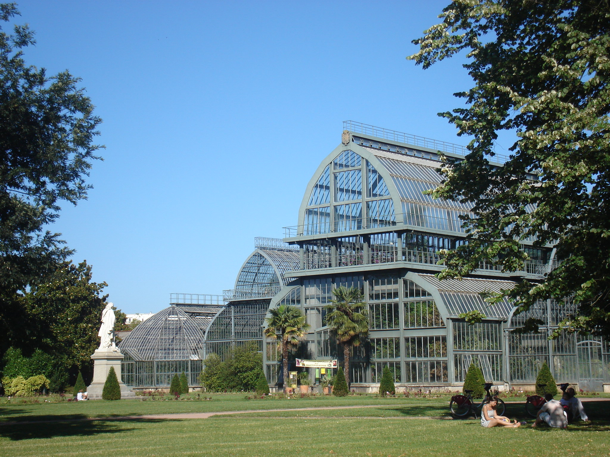 Grandes serres du Parc de la Tête d'Or, Lyon